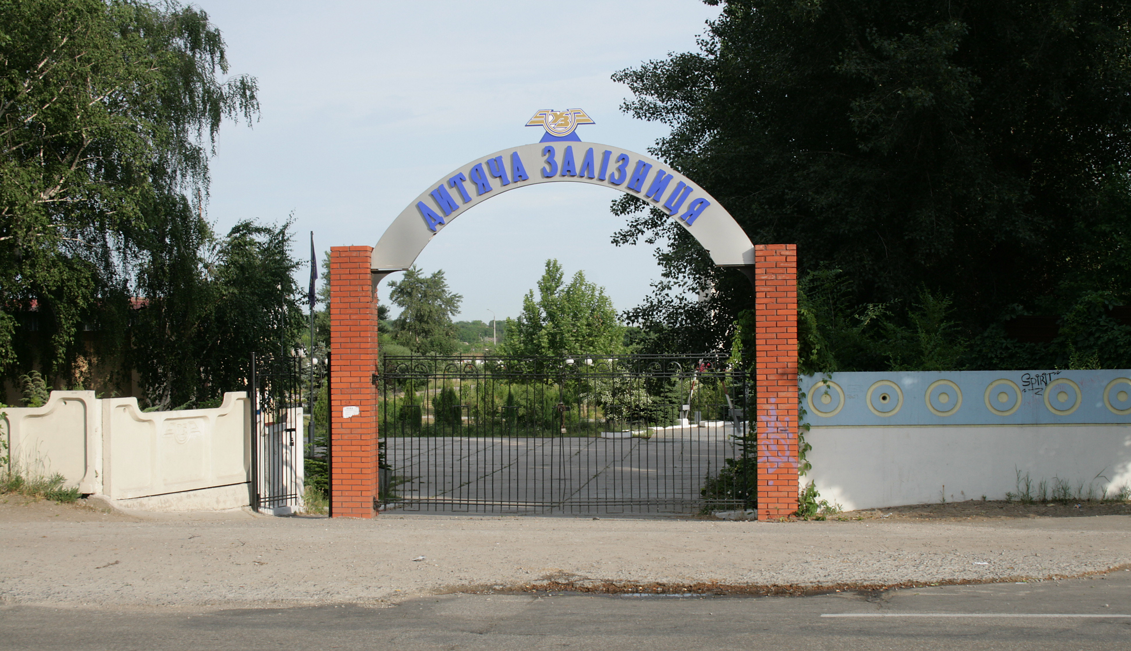 Запорожская детская железная дорога - главный вход.